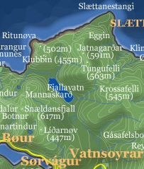 Das Fjallavatn auf einer Landkarte der Insel Vágar/Färöer Lizenz: Public Domain